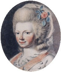 Reichsgräfin Katharina von Ottweiler (1757-1829), genannt "Gänsegretel von Fechingen"